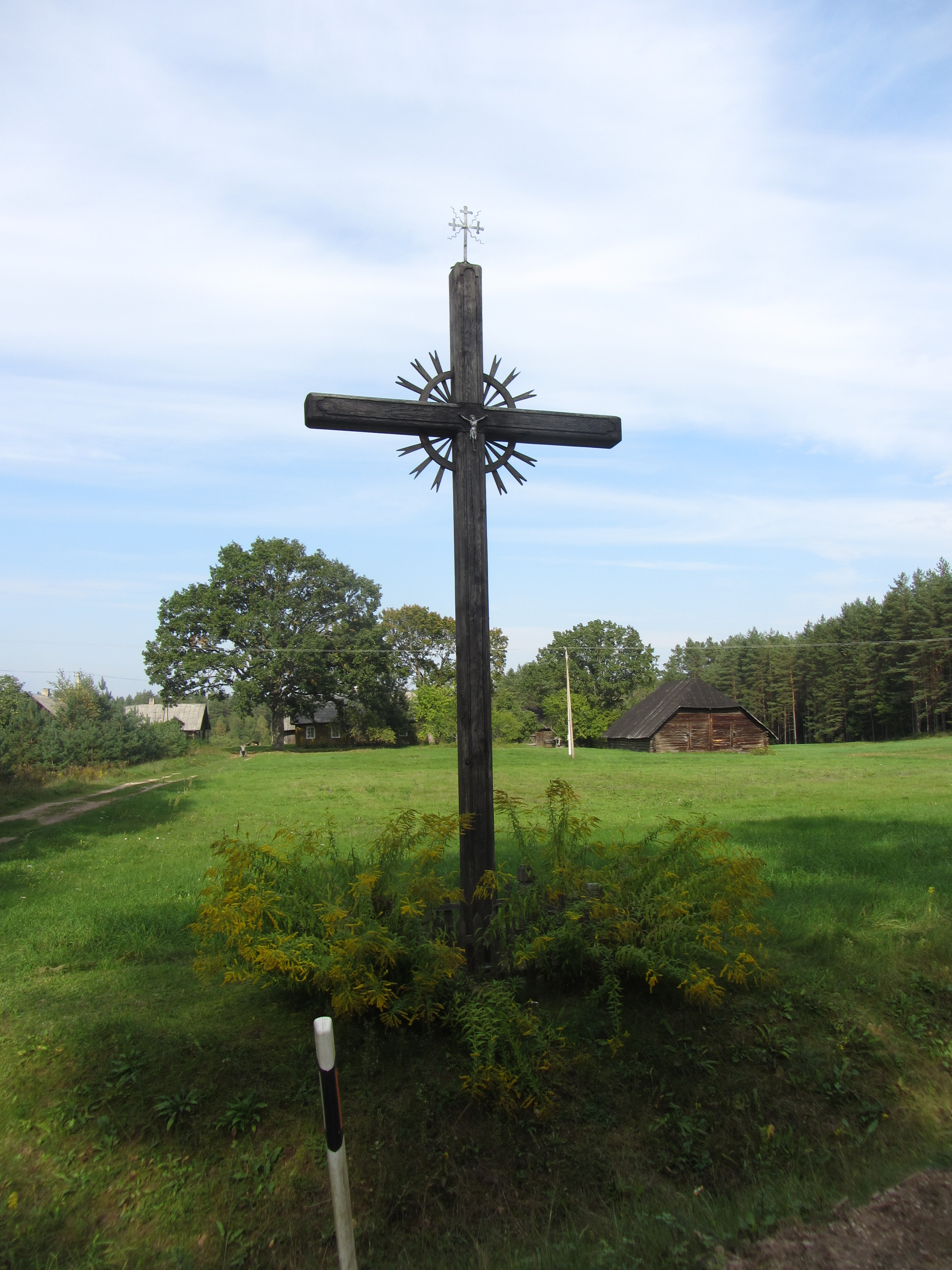 Labanoro sen., Lithuania